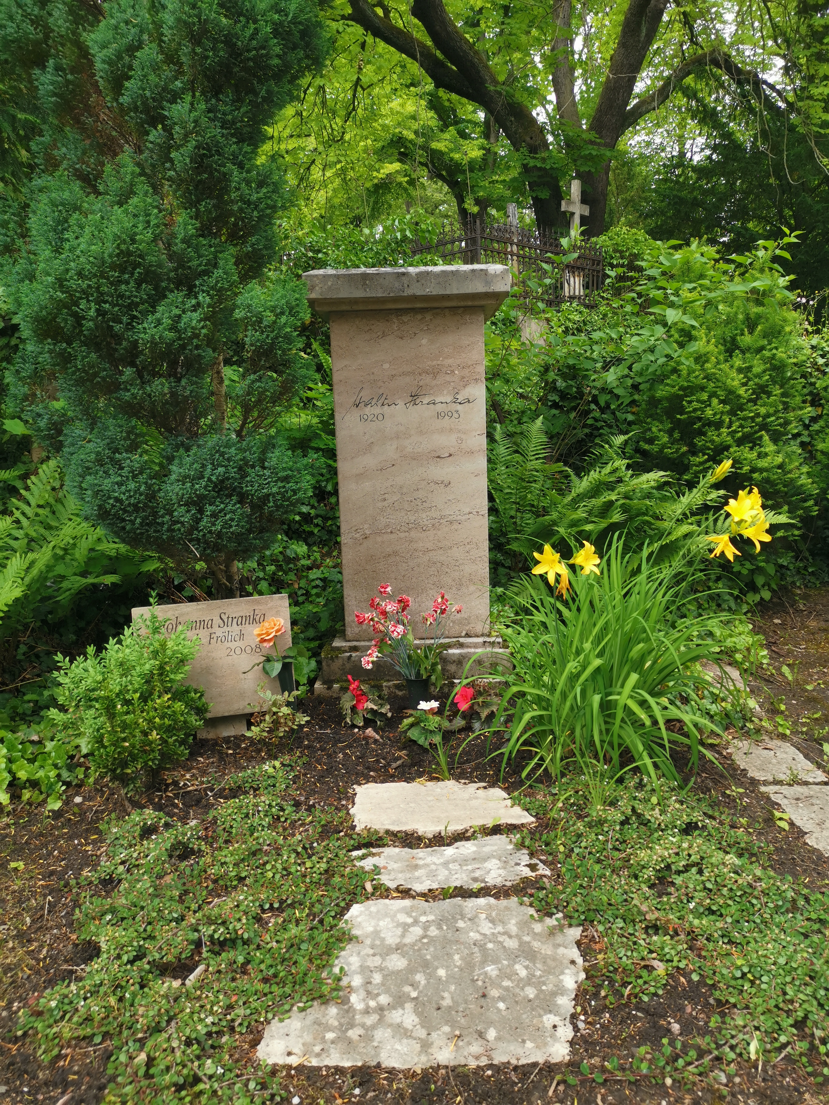 Grab Walter Stranka; Historischer Friedhof Weimar